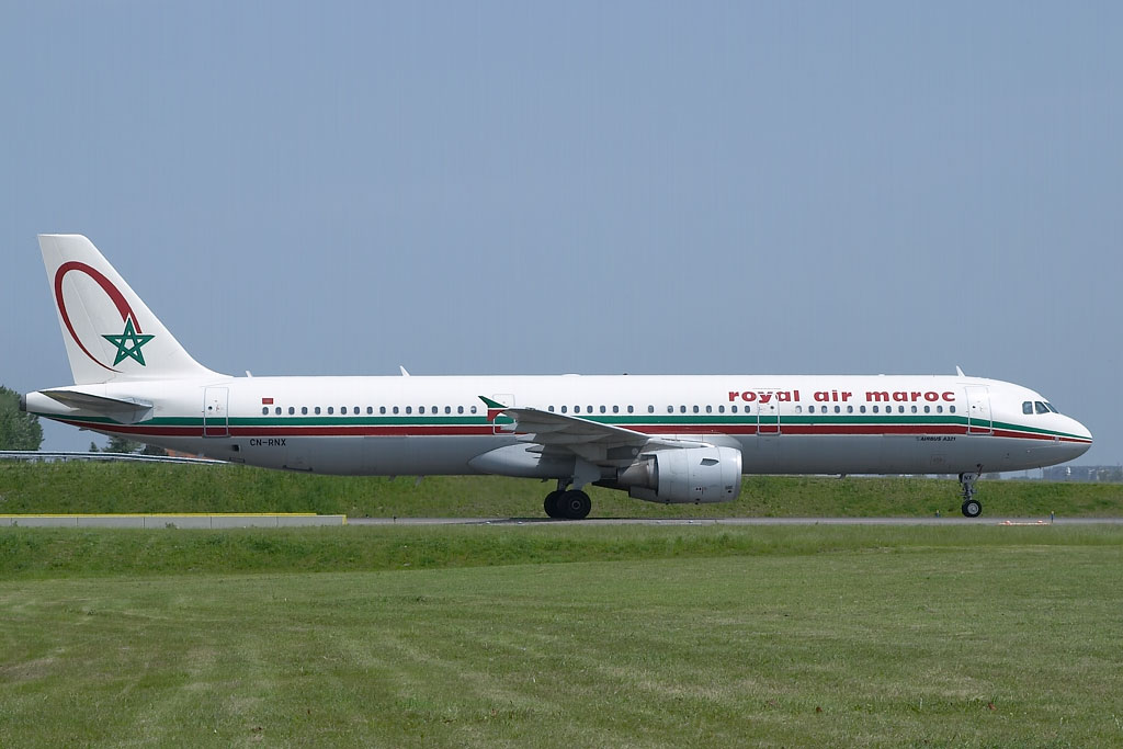 Airbus A321-211 de la compagnie Royal Air Maroc